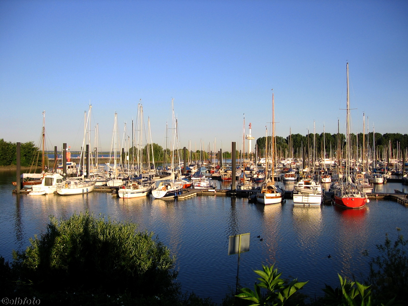 Der Hamburger Yachthafen in Wedel in den frühen Morgenstunden.